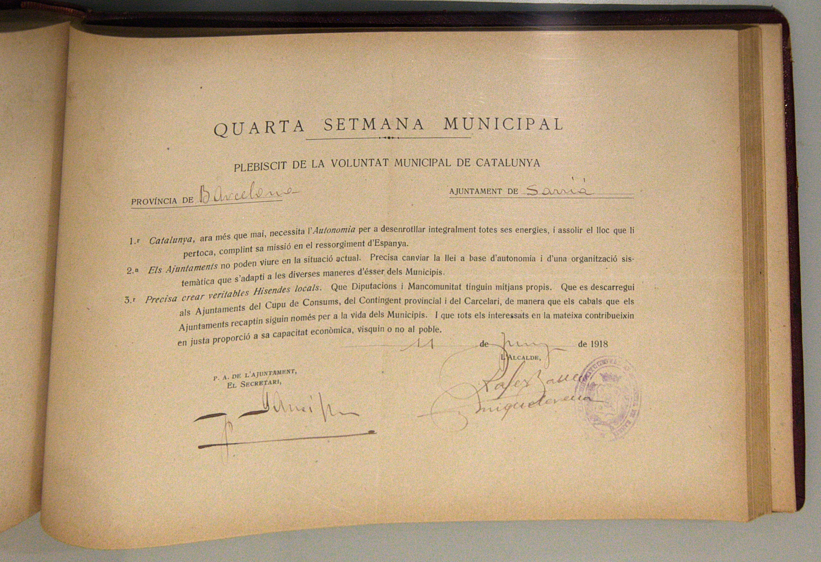 Plebiscit de la voluntat popular del municipi de Sarrià on es demanava la creació d'una autonomia per a Catalunya.